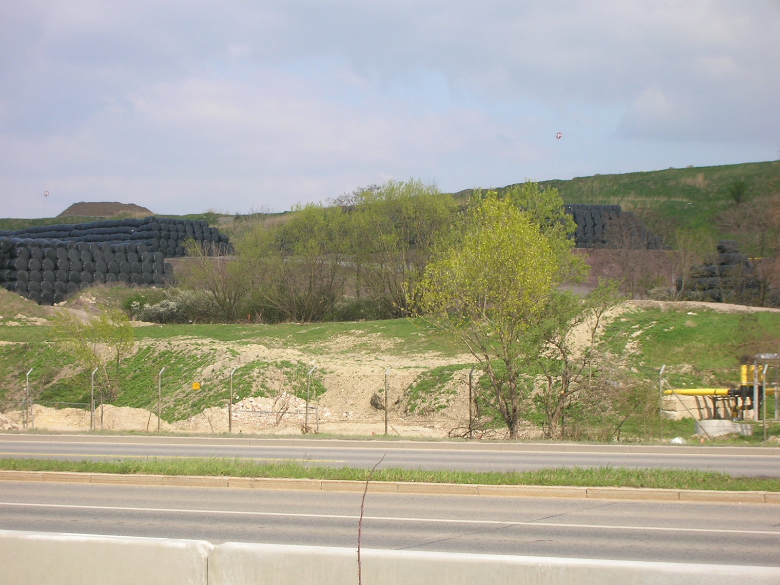 Deponie Rautenweg mit zwischengelagerten Ballen 2008